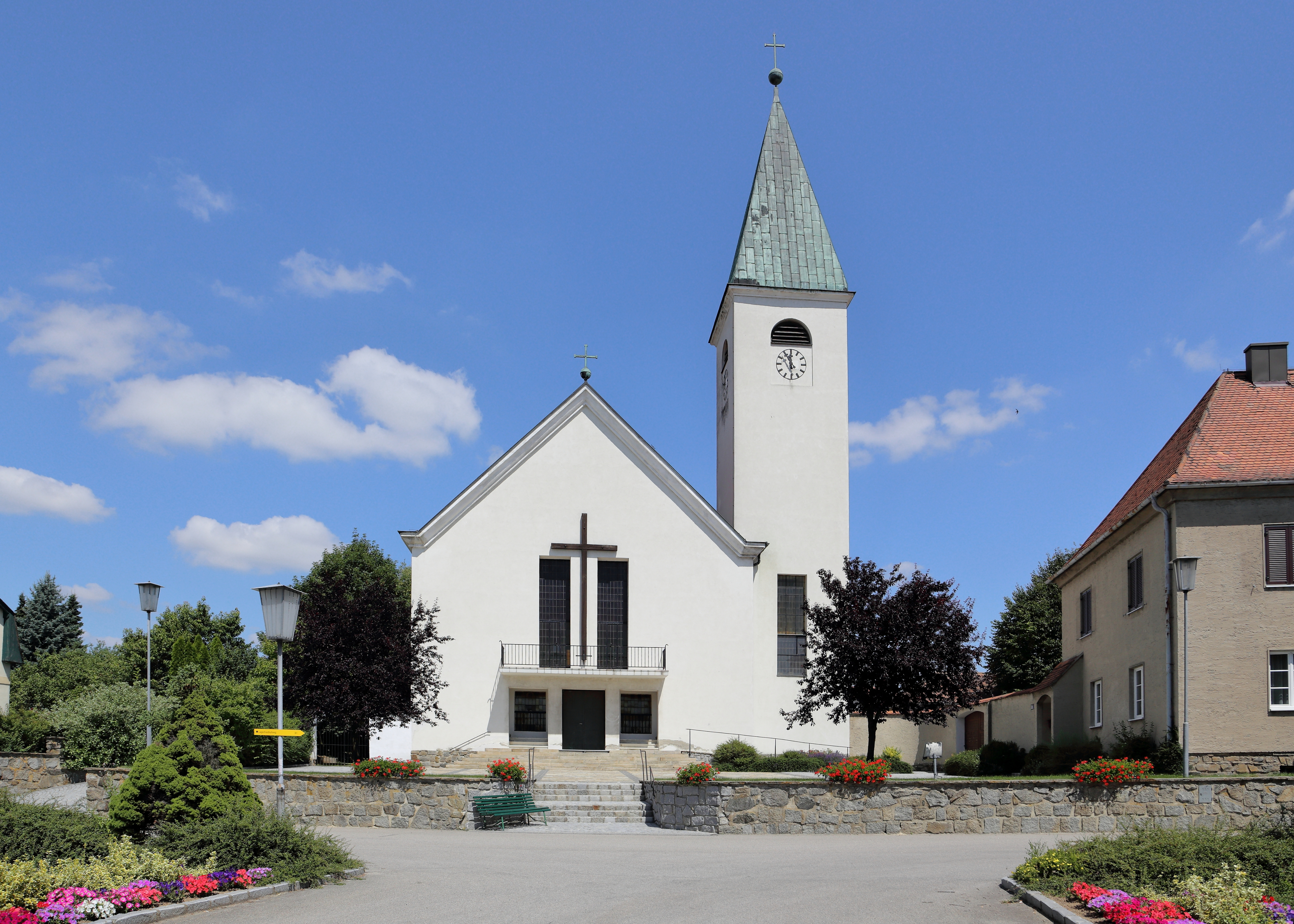 Die römisch-katholische Pfarrkirche hl. Christophorus in der niederösterreichischen Marktgemeinde Sigmundsherberg.